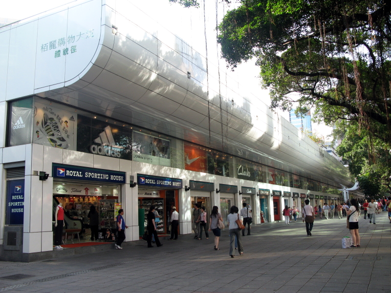 HK Parklane Avenue in Tsim Sha Tsui